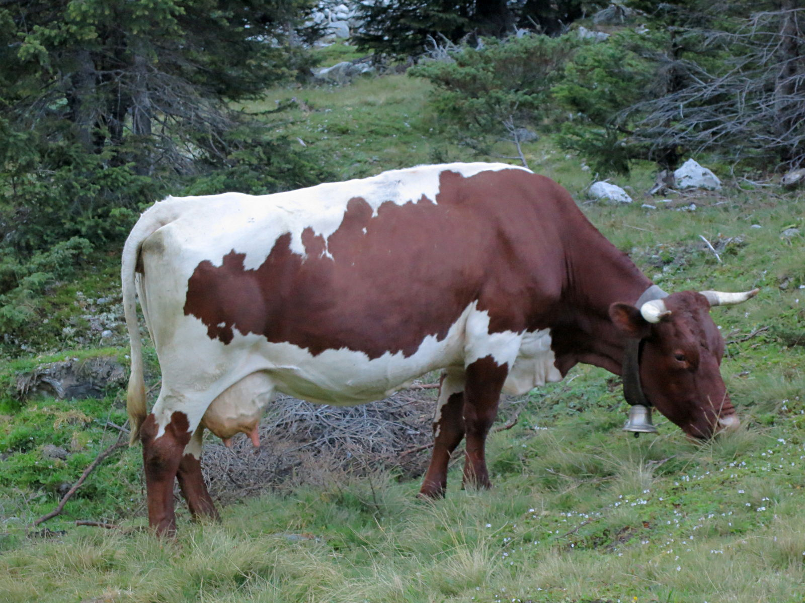 Vache de race Pinzgauer, Achental, Autriche